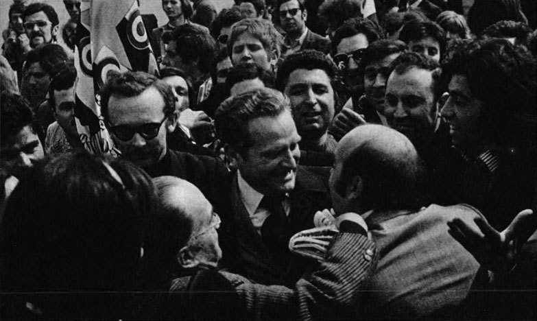 Torino, aeroporto di Torino-Caselle, 22 marzo 1973. Il presidente della Juventus, Giampiero Boniperti, circondato dai tifosi che accolgono festanti la squadra bianconera, reduce dalla trasferta del giorno precedente a Budapest contro l'Újpesti Dózsa (2-2) valevole per il ritorno dei quarti di finale della Coppa dei Campioni 1972-73: il risultato, a fronte dello 0-0 maturato nella sfida di andata e in virtù della regola dei gol in trasferta, valse ai torinesi l'accesso alle semifinali della competizione.